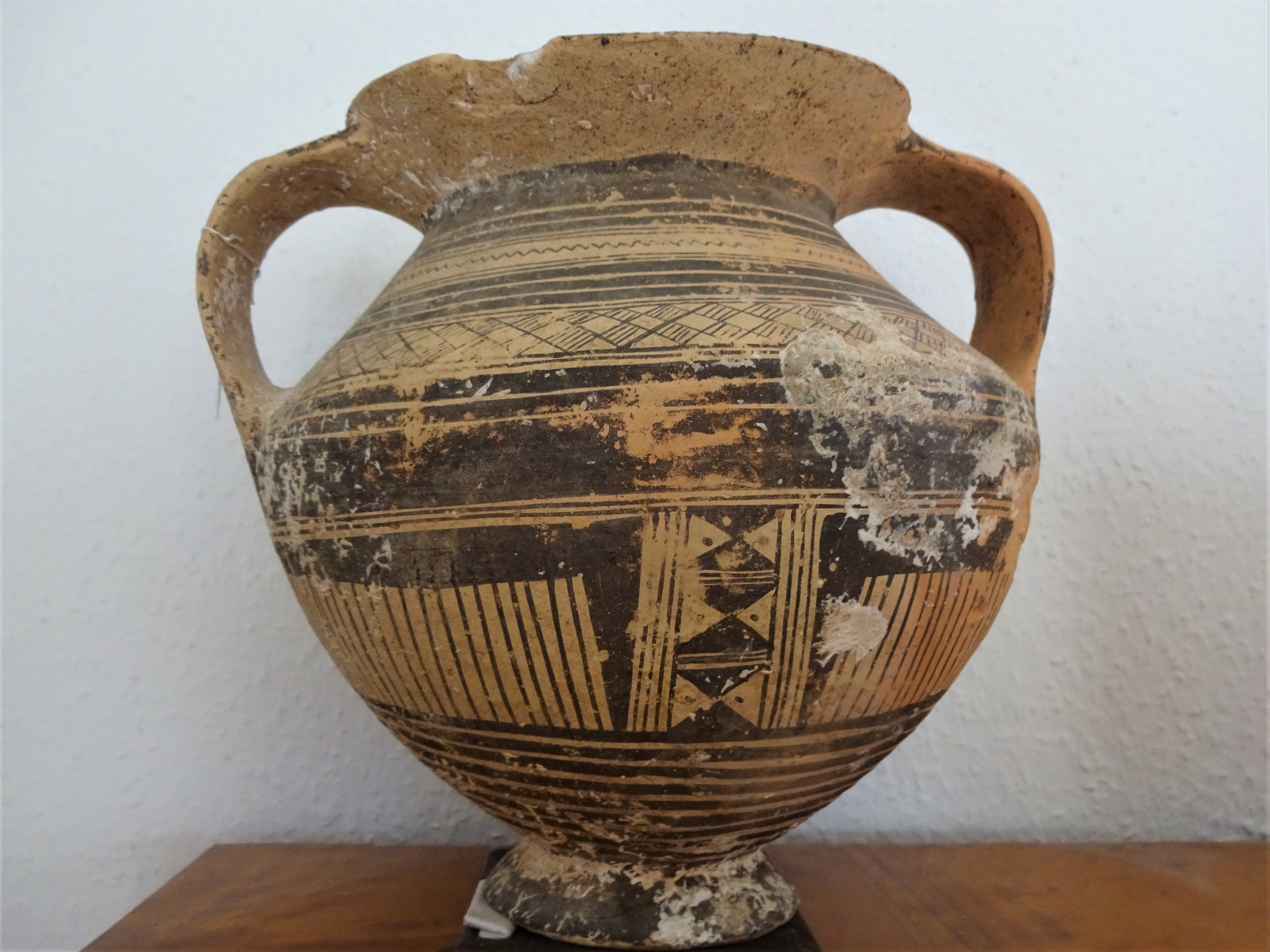 Peuketischer Krater, 575 bis 525 v. Chr, 26,8 cm hoch, Gorny und Mosch, Auktion 264 (Juni 2019), Los-Nr. 74